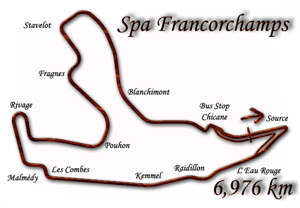 Plánek trati Spa na kterém se mistrovství vozů F1 jelo v letech 2004 - 2005